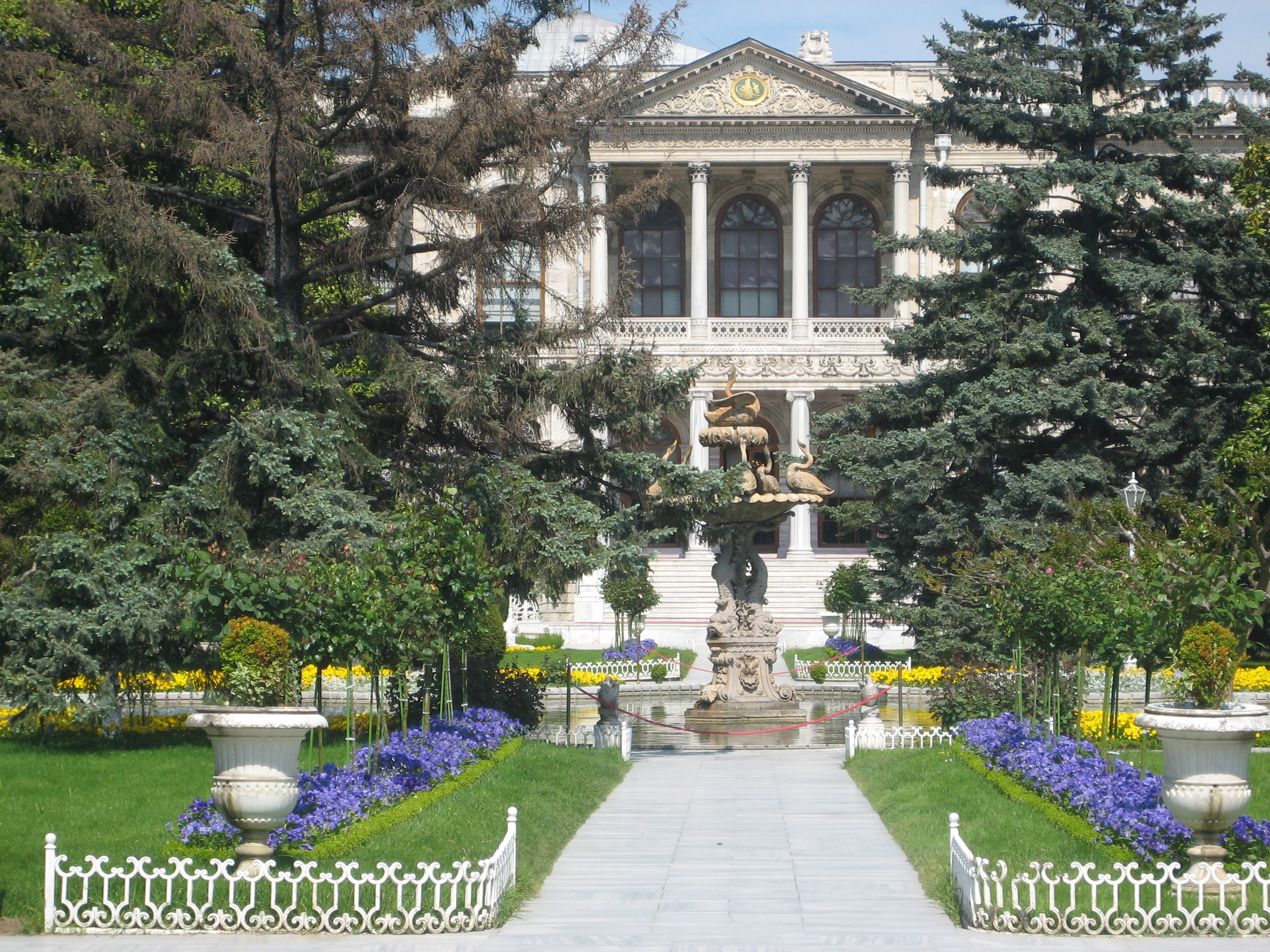 Kategori:İstanbul resimleri